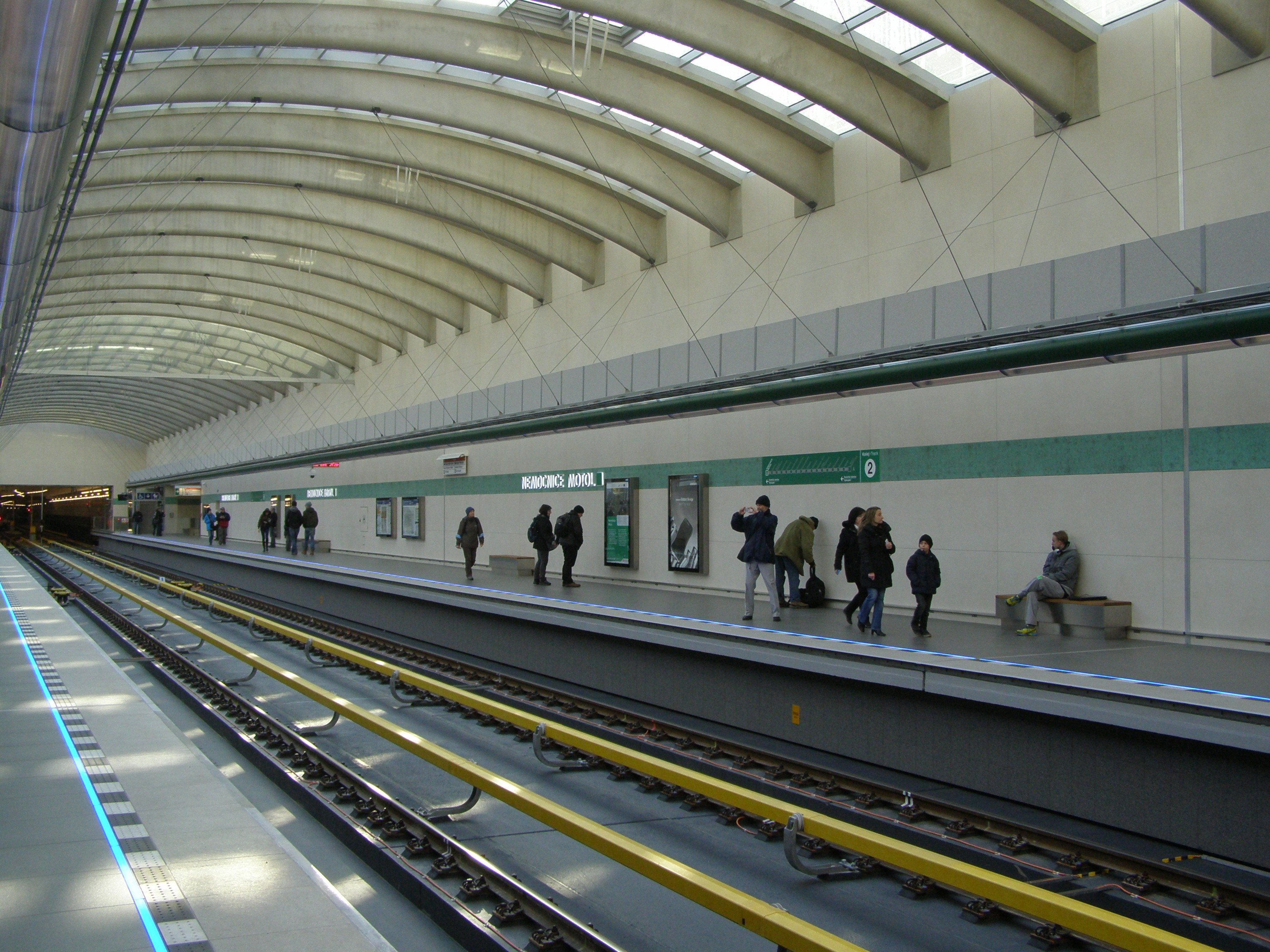 Praha, stanice metra Nemocnice Motol